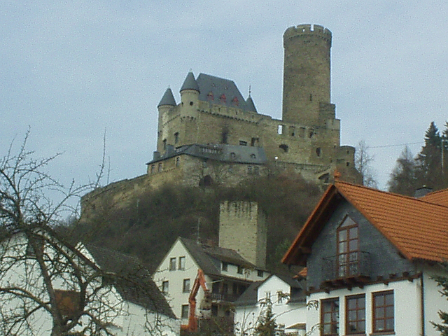 Burg Schwalbach